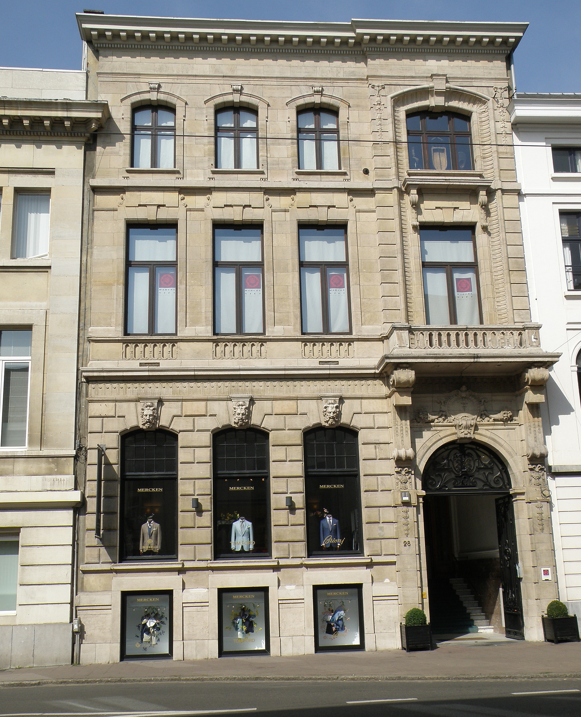 Antwerpen, district Antwerpen. Herenhuis aan de Lange Gasthuisstraat nr. 28, in neo-Lodewijk-XIV-stijl. Ontwerp van Henri Blomme (1907). Vgl. Inventaris Onroerend Erfgoed.